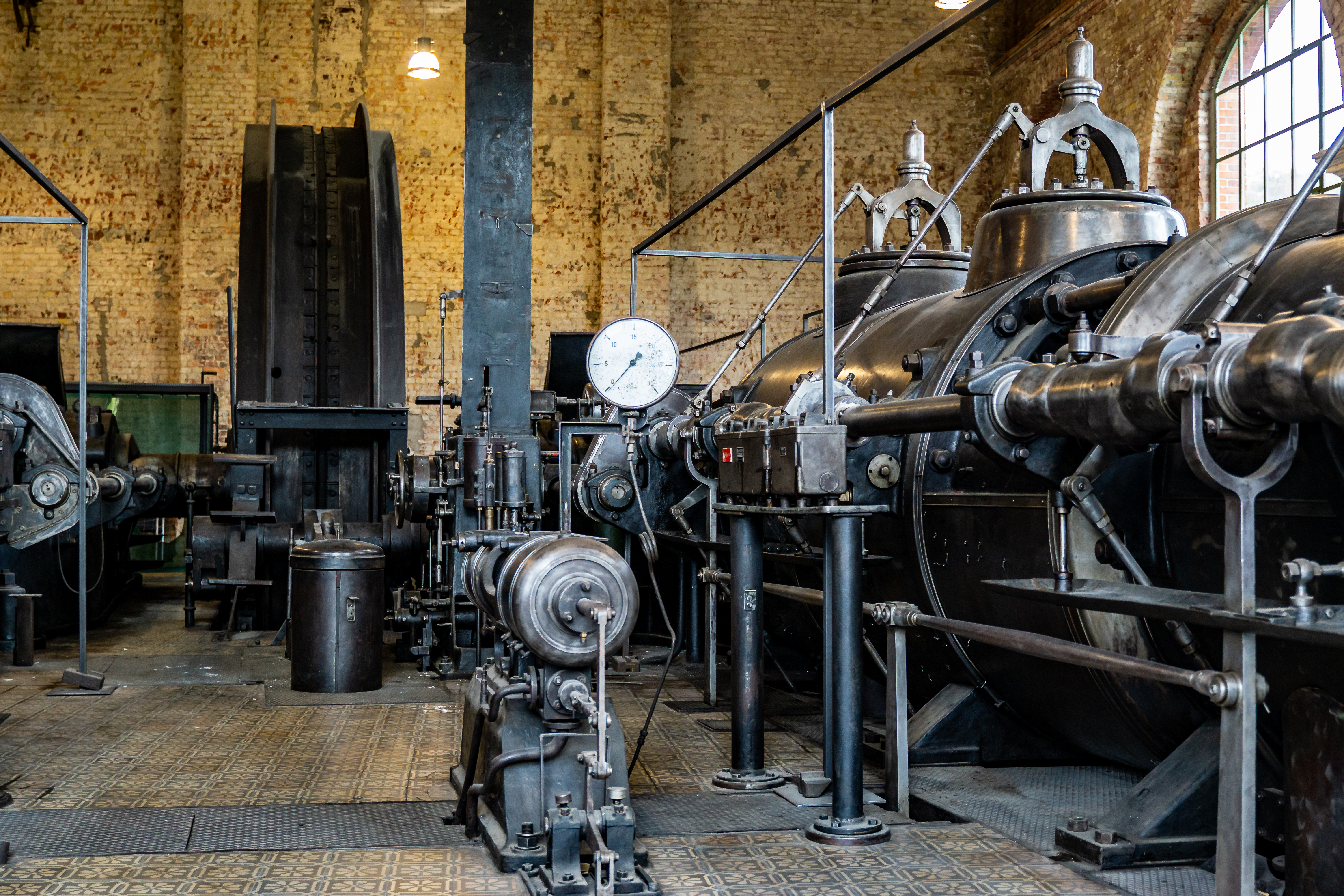 Tag des offenen Denkmals 2019: Zeche Waltrop - Maschinenhalle III/IV - Vierzylinder Tandem Fördermaschine der Eisenhütte Prinz Rudolph